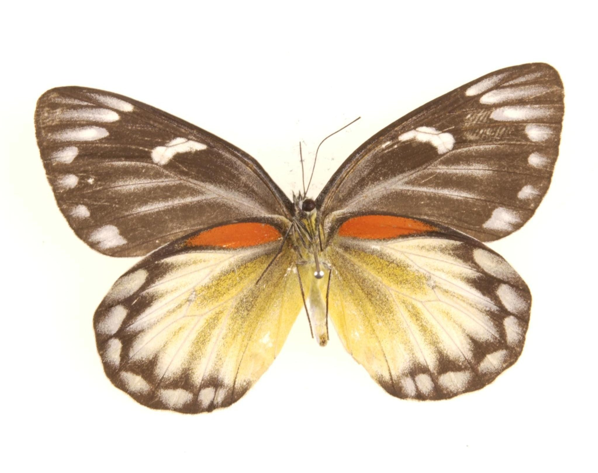 Delias descombesi Underside